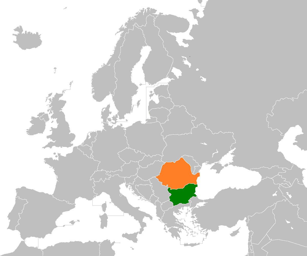 Bulgaria-Romania locator map.